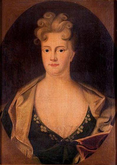 Charlotte Amalie von Hessen-Wanfried (1679-1722), Tochter des Landgraf Karl (Hessen-Wanfried)